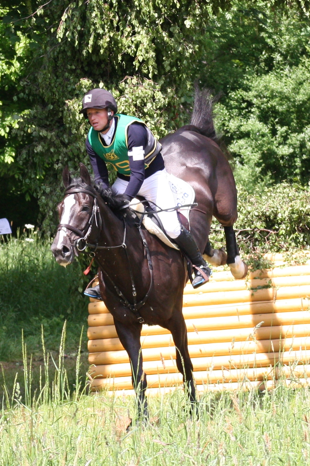 77. Internationales Pfingstturnier Wiesbaden 2013, CIC *** Vielseitigkeit Geländeprüfung, Jung, Michael mit Halunke FBW Personality rights warning Although this work is freely licensed or in the public domain, the person(s) shown may have rights that legally restrict certain re-uses unless those depicted consent to such uses. In these cases, a model release or other evidence of consent could protect you from infringement claims.